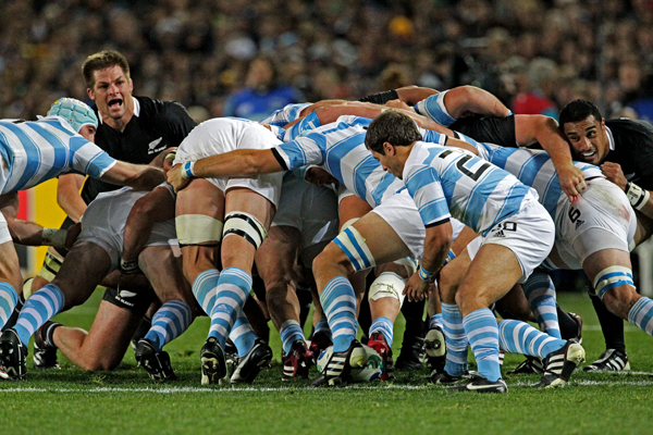 COUPE DU MONDE DE RUGBY 2011 NOUVELLE ZELANDE ARGENTINE